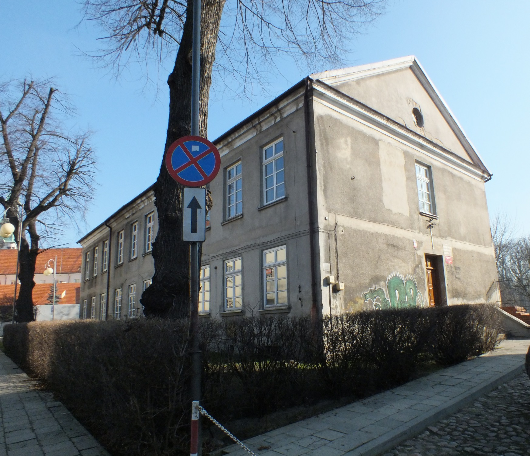 Budynek administracji - wypożyczalnie znajdują się w innych lokalizacjach